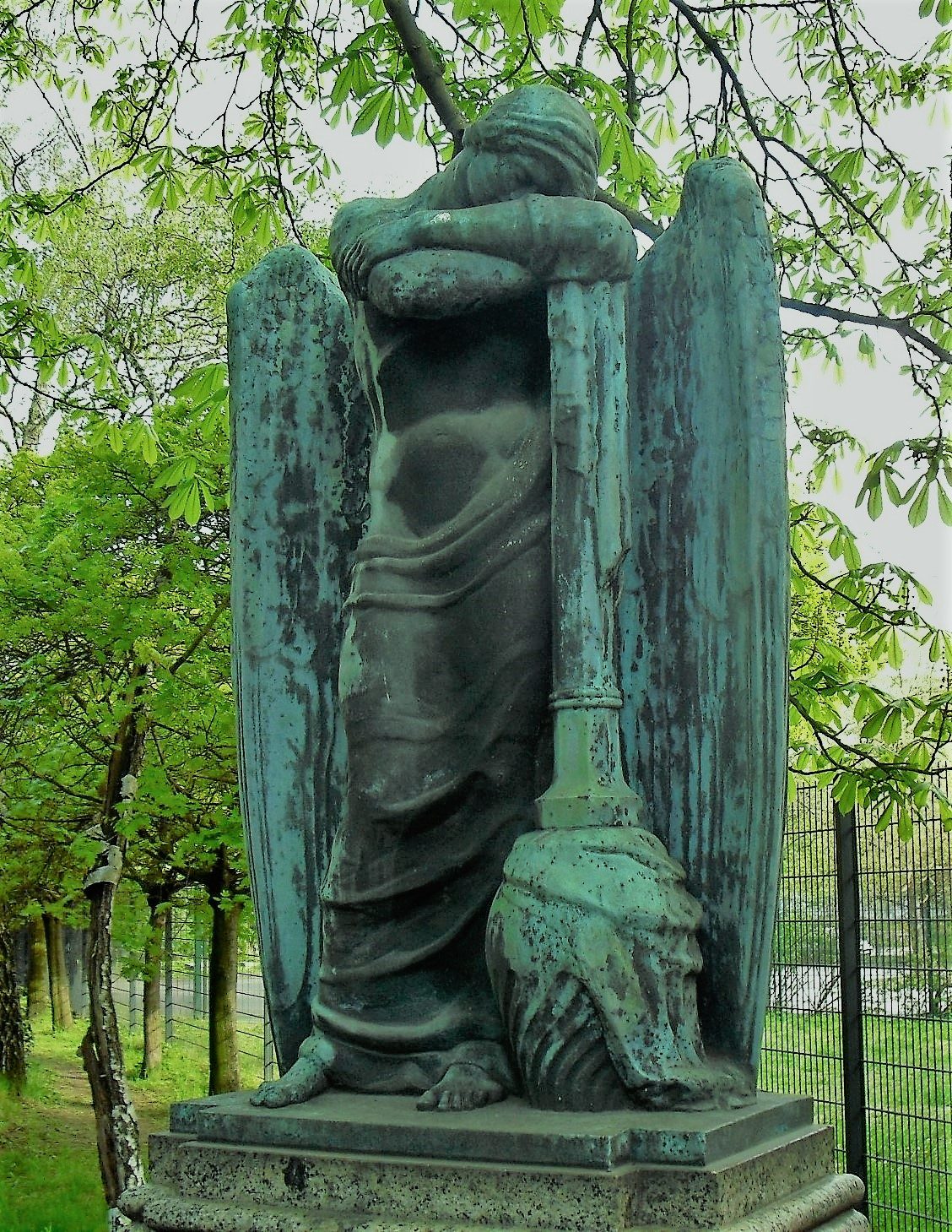 Gefallenendenkmal auf dem Neuen Kirchhof von St. Nikolai und St. Marien, geschaffen von Robert Saake, 1927. Gewidmet Den im Weltkriege 1914-1918 für das Vaterland gefallenen Söhnen der Mariengemeinde